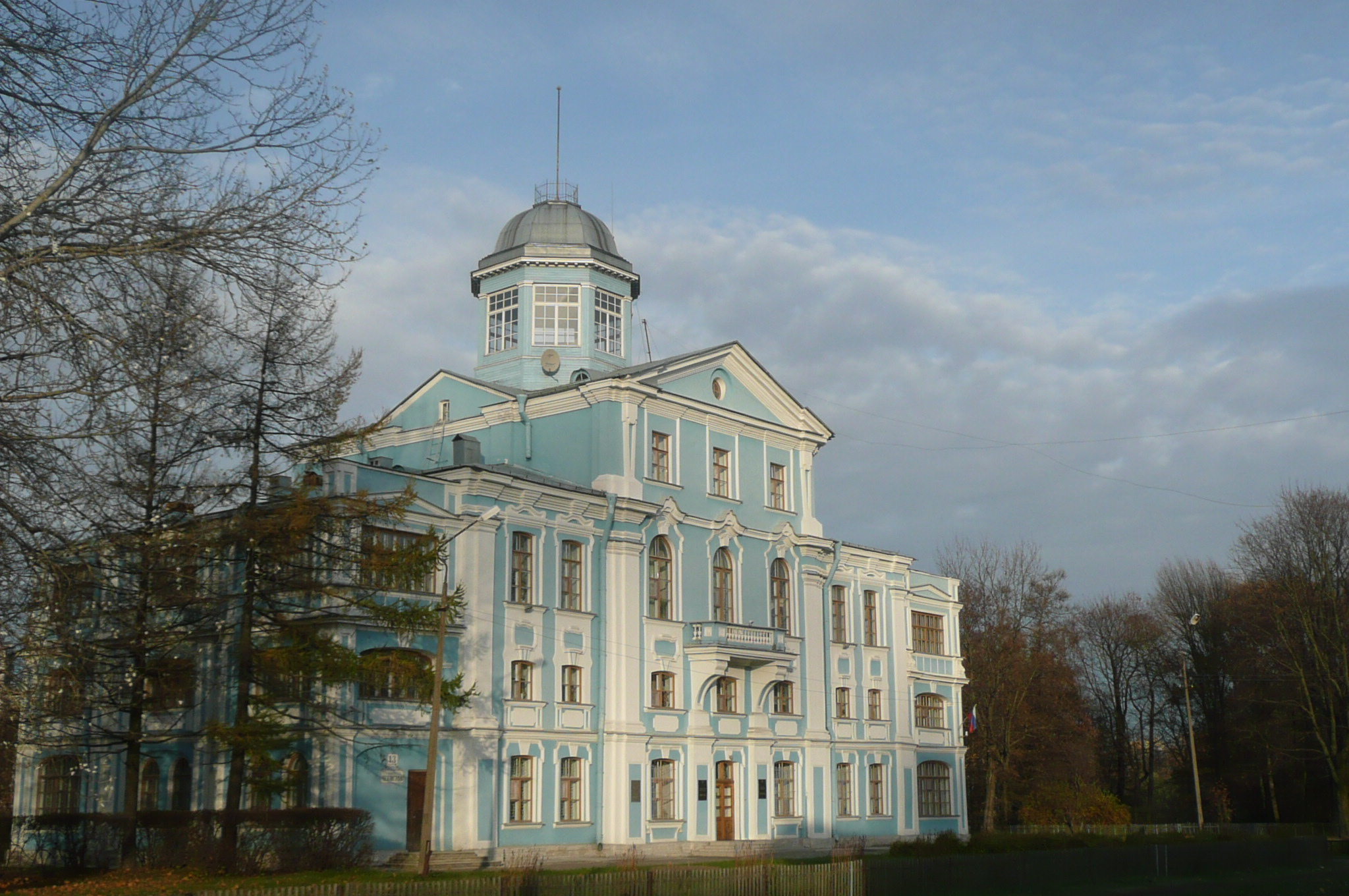 Санкт-Петербург. Петергофское шоссе, Парк «Новознаменка» (дача Воронцова)